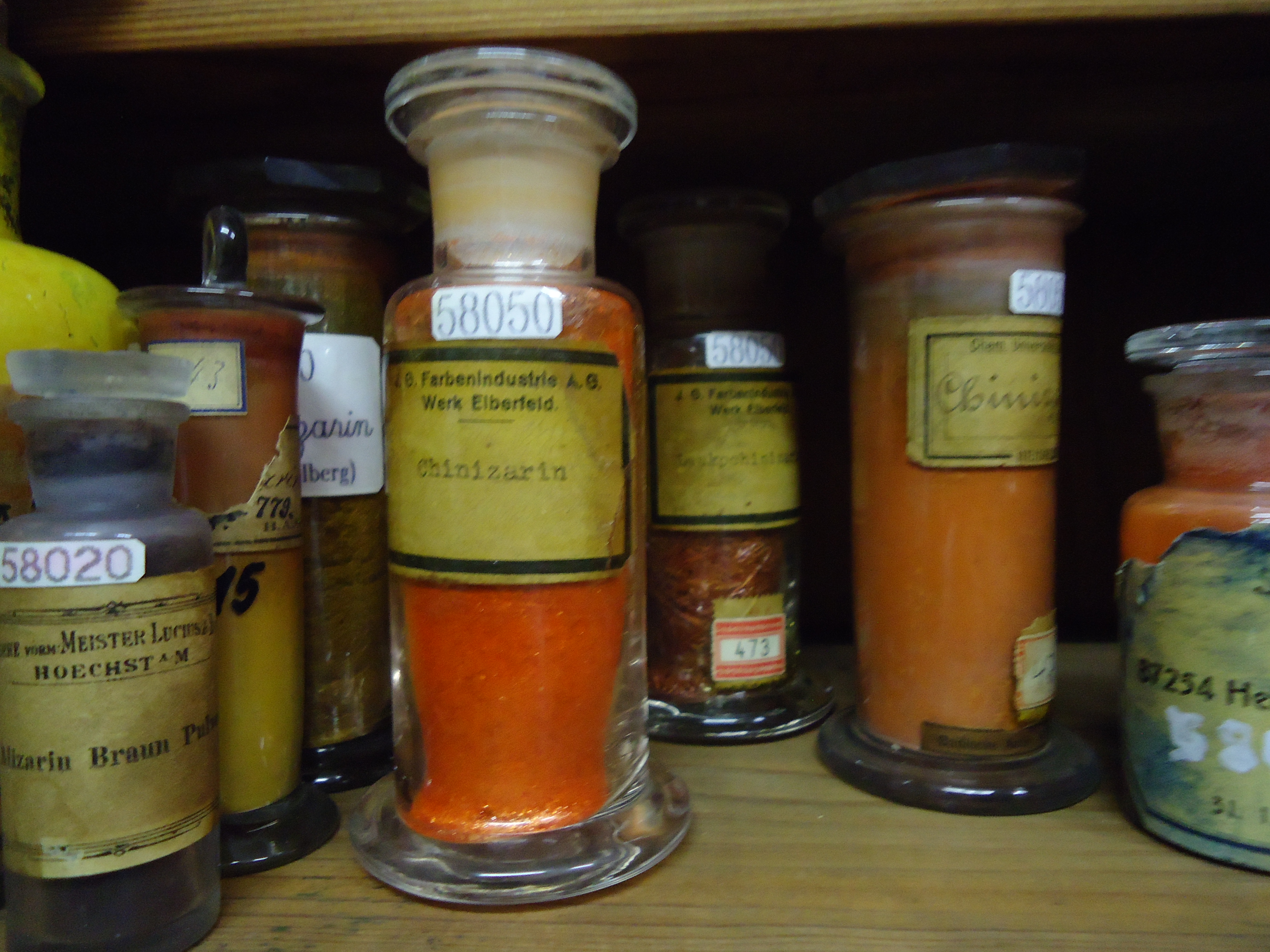 Blick in die Historische Farbstoffsammlung der TU Dresden (Historische Farbstoffsammlung der TU Dresden)